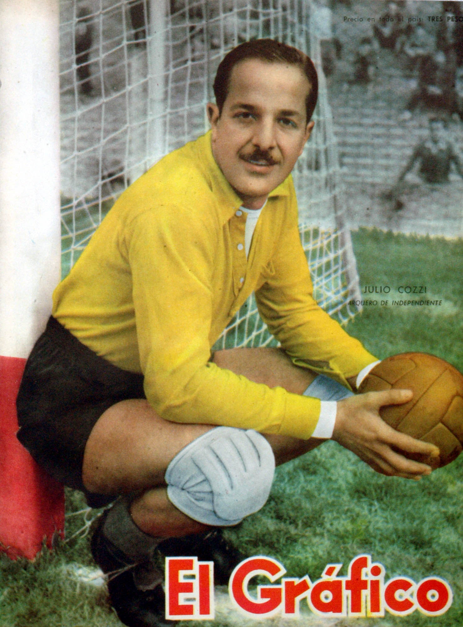 El Grafico del 20 de Septiembre de 1957. Edicion 1984